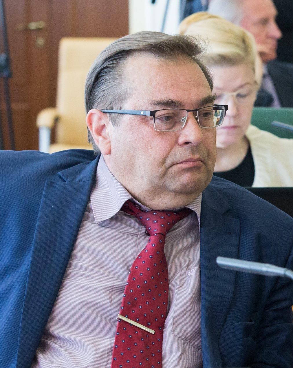 Юрий Александрович Петров (род. 1955) — российский историк